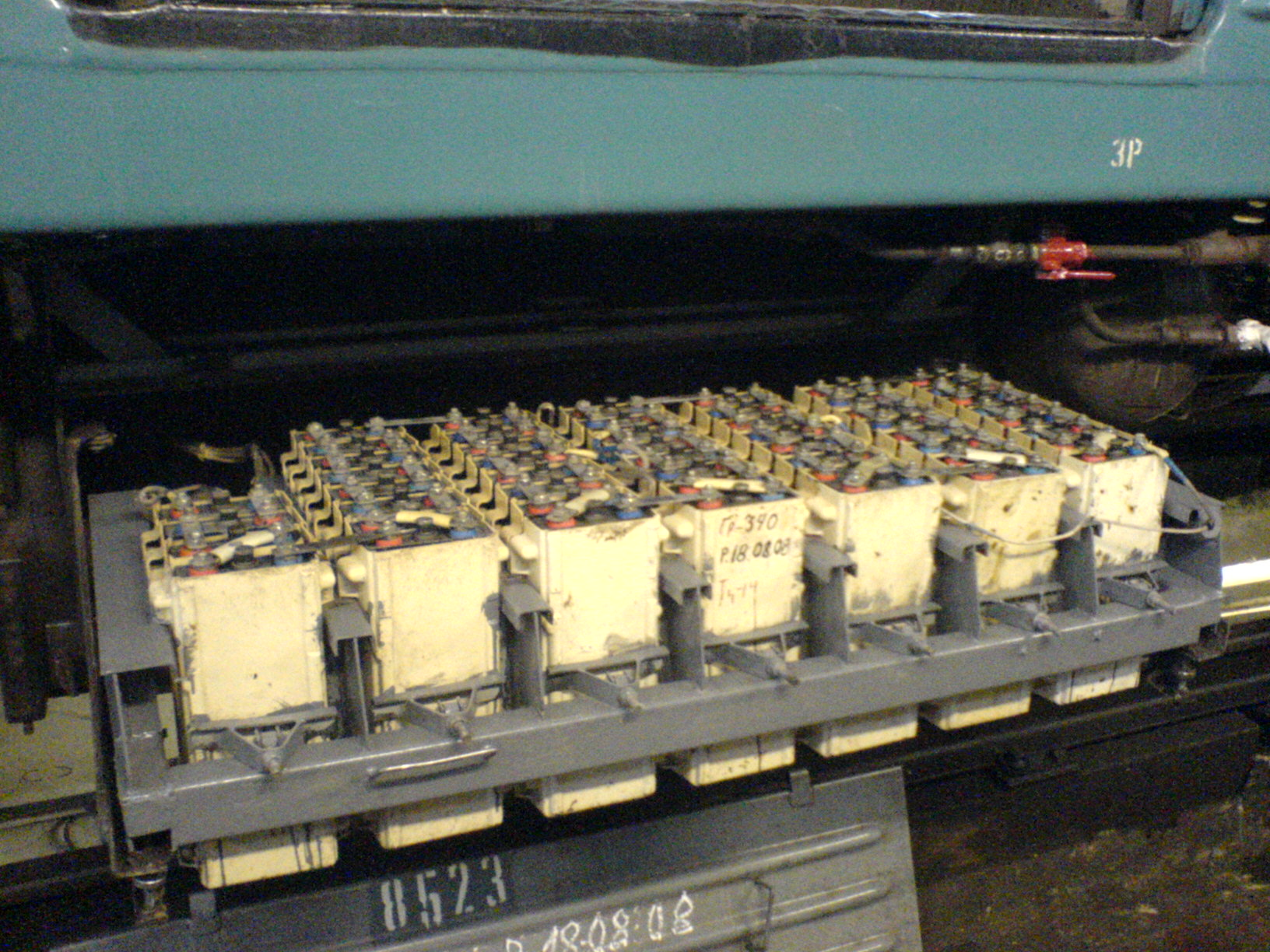 Аккумуляторная батарея из элементов KPL-55 на вагоне 81-714 (выдвинута на обслуживание)